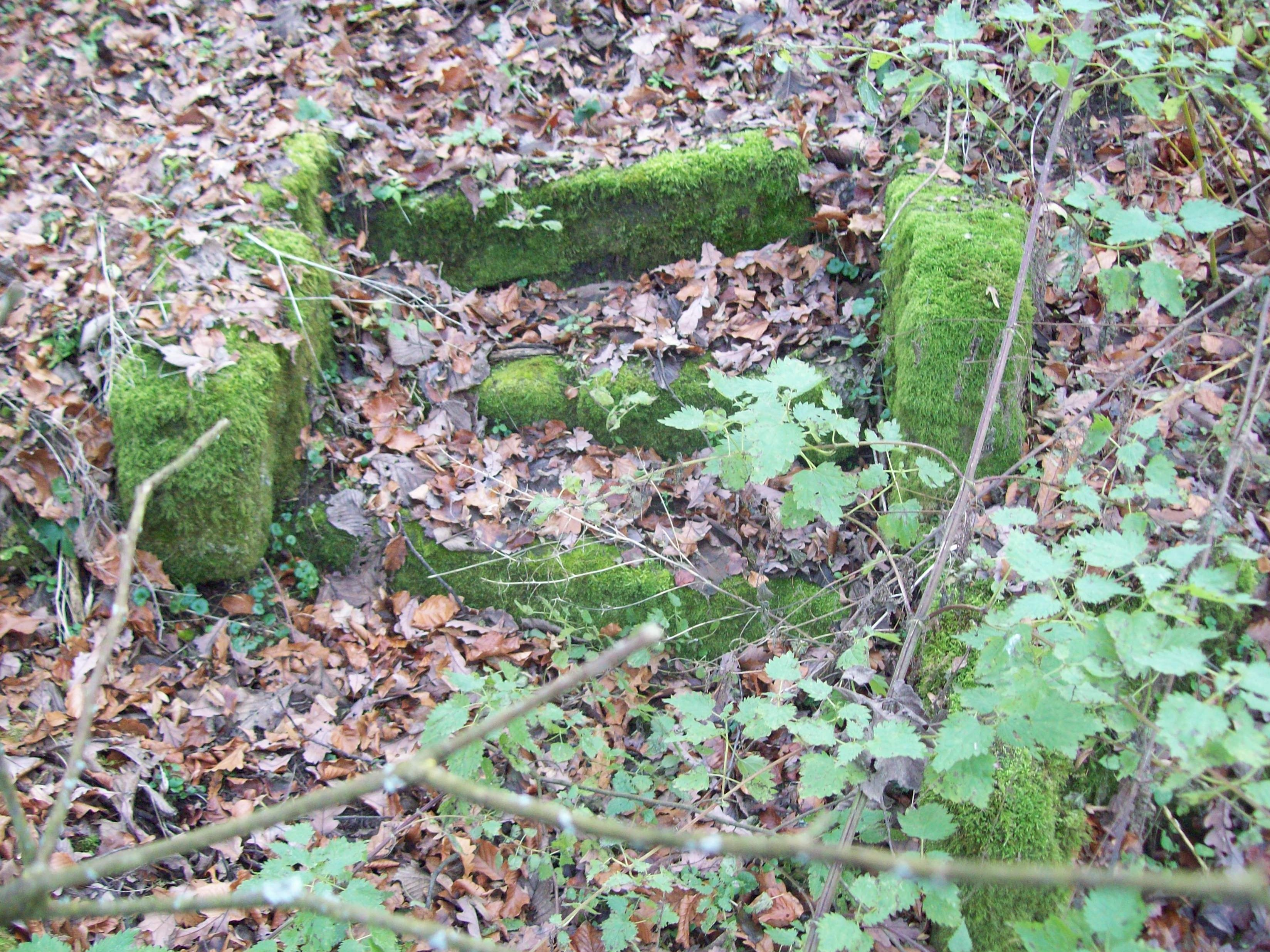 Original-Treppe der Stufenburg